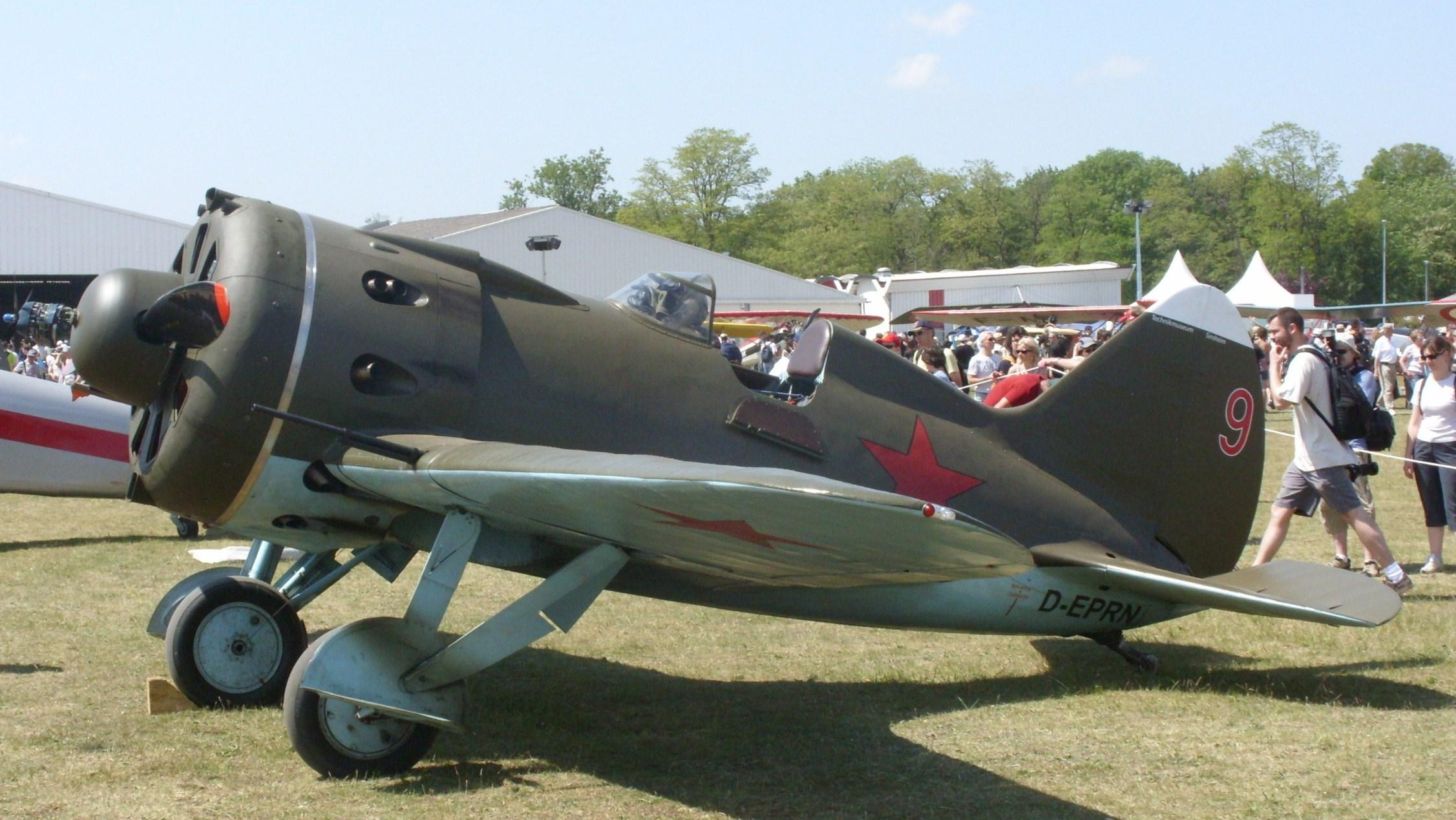 Ferté-Alais 2010